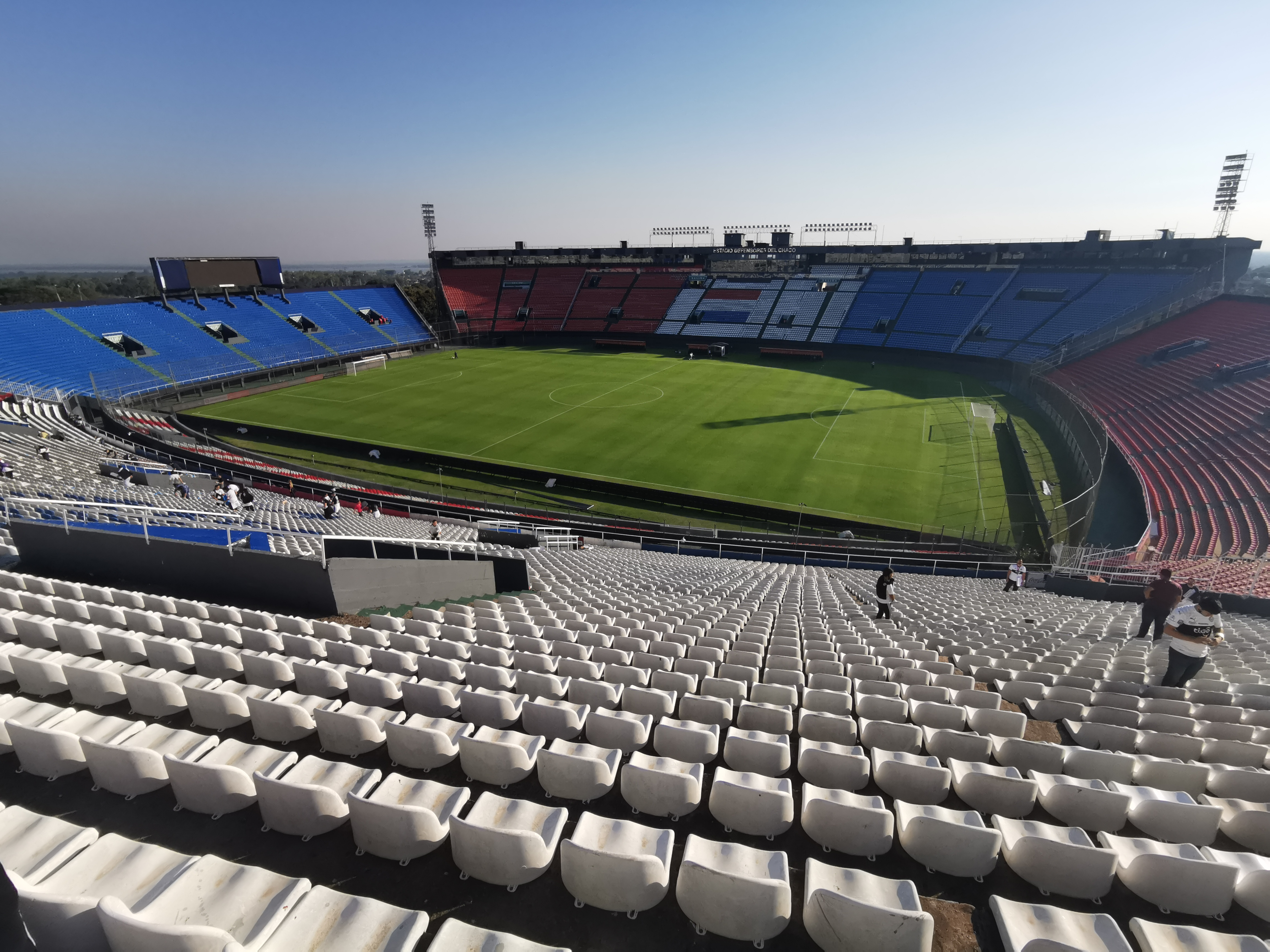 Vista panorámica del estadio Defensores del Chaco, en Asunción, Paraguay. Previo al partido de vuelta, fase octavos de final, de la Copa Libertadores 2019 entre Club Olimpia (PAR) y Liga Deportiva Universitaria de Quito (ECU).